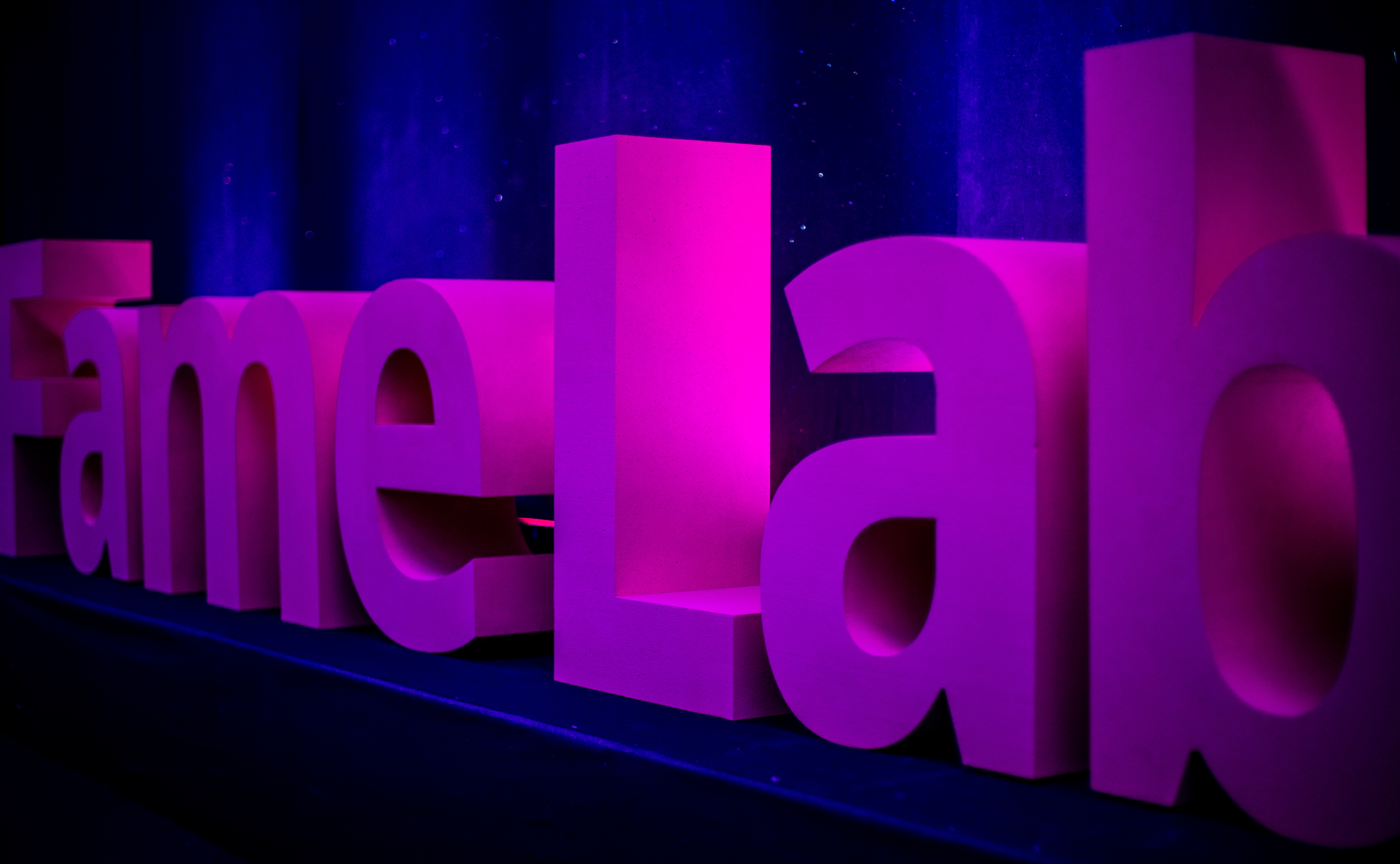 25.04.2015 WARSZAWA CENTRUM NAUKI KOPERNIK - FINAŁ KONKURSU FAMELAB 2015 FOT. ADAM KOZAK